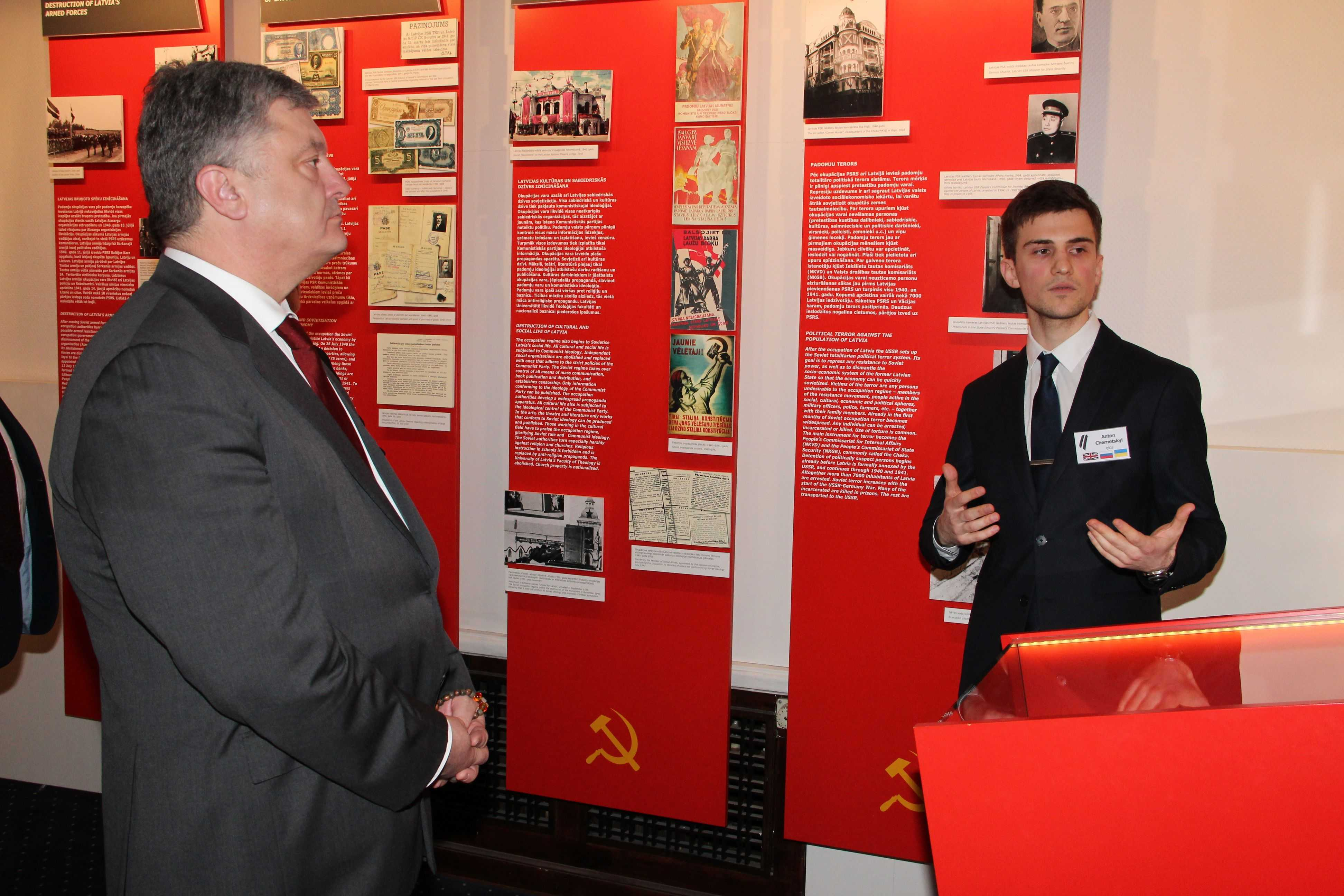 В рамках официального визита Президент Украины посетил Музей оккупации